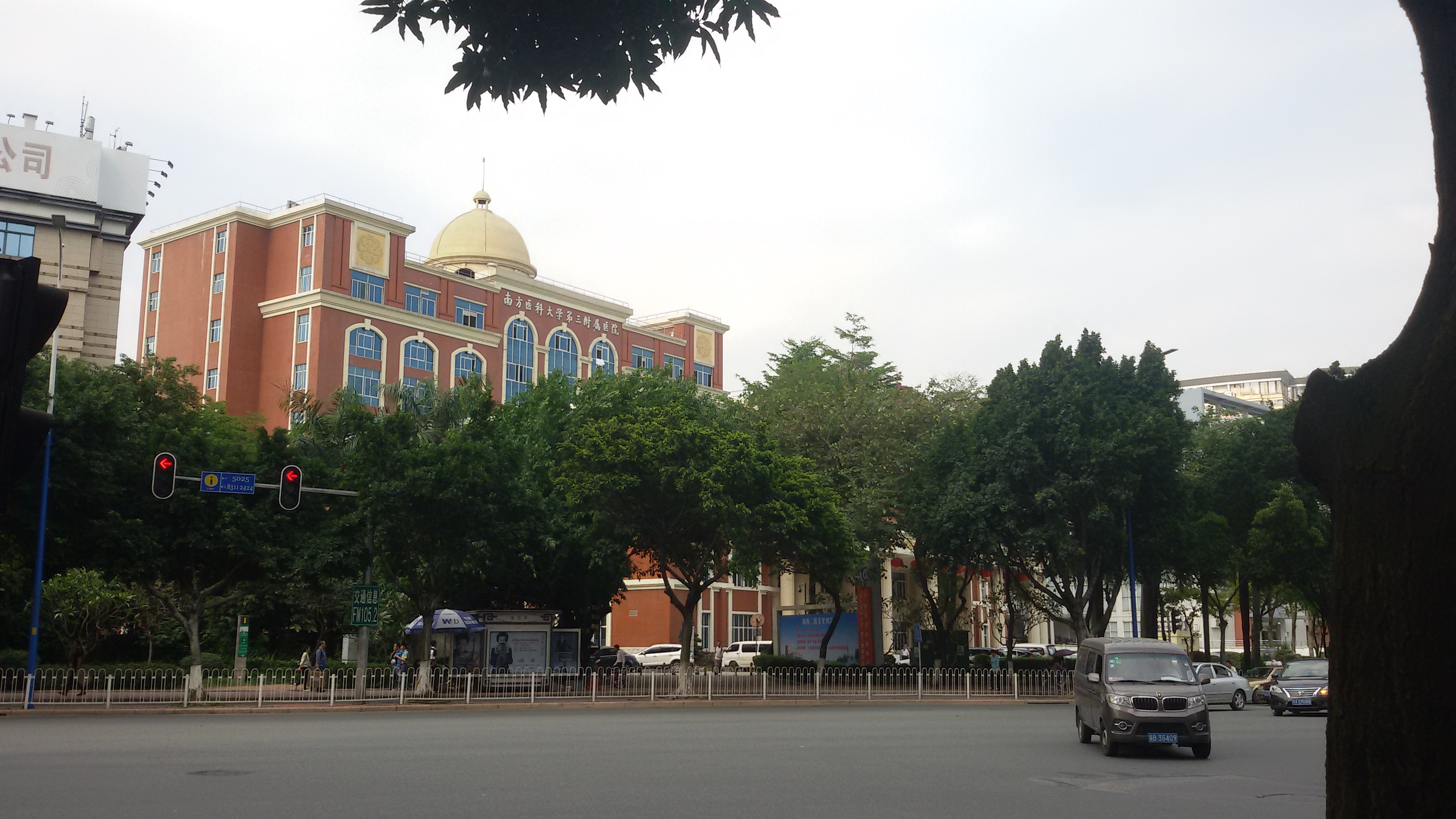 粵語: 南方醫科大學第三附屬醫院